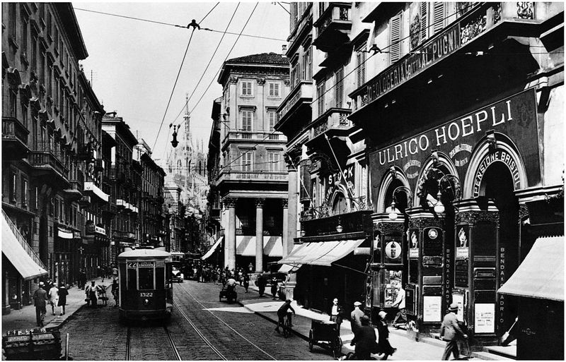 In fondo al corso Vittorio Emanuele II il Duomo; a destra, dopo la Galleria, si intravvede l'ingresso alla piazza della chiesa di San Carlo. La foto è scattata intorno al 1929.